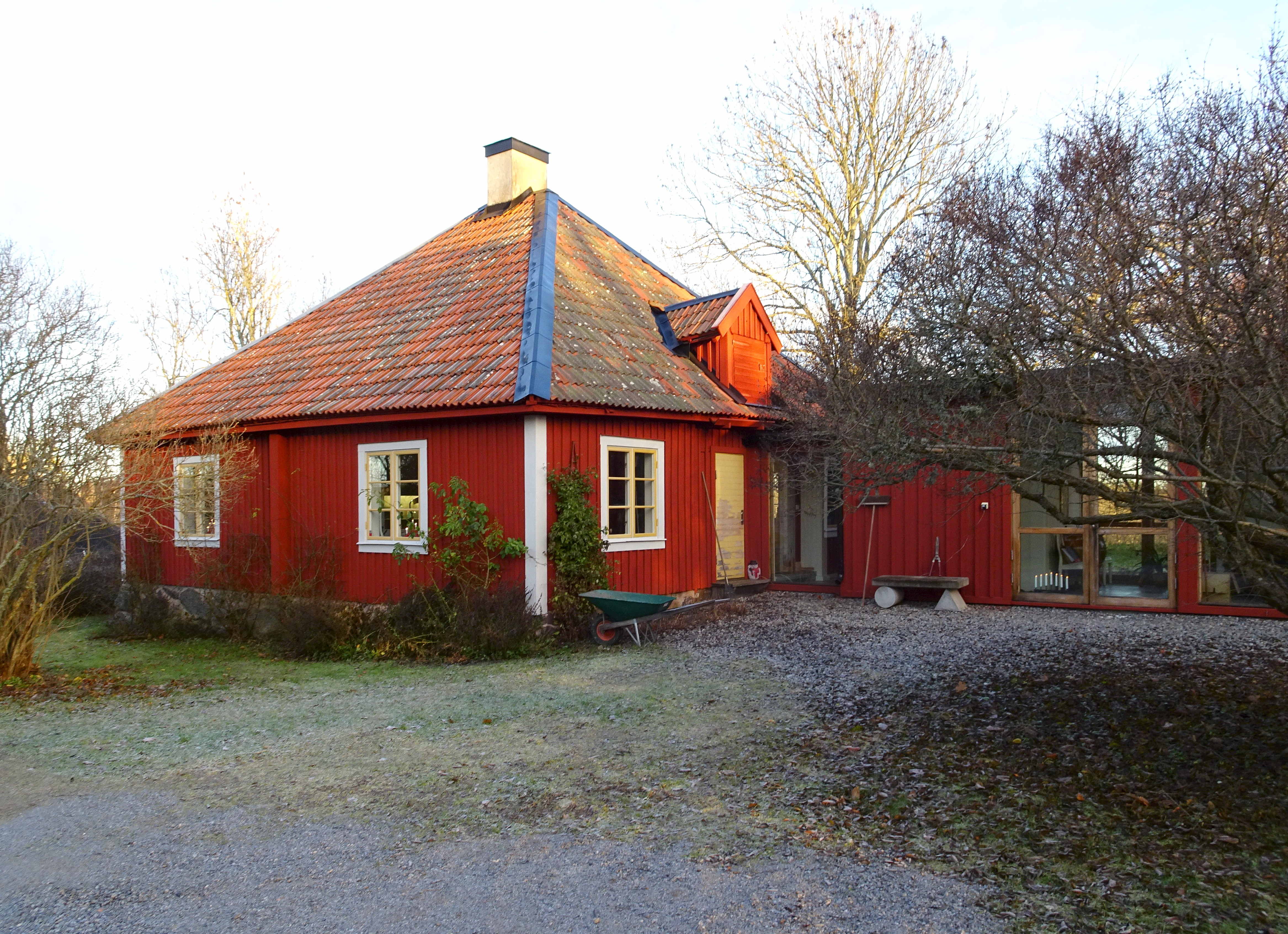 Ristomta gård, huvudbyggnad